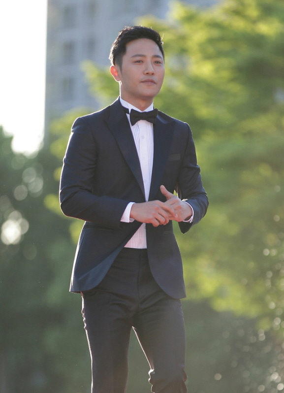 제19회 부천국제판타스틱영화제 레드카펫 part.3